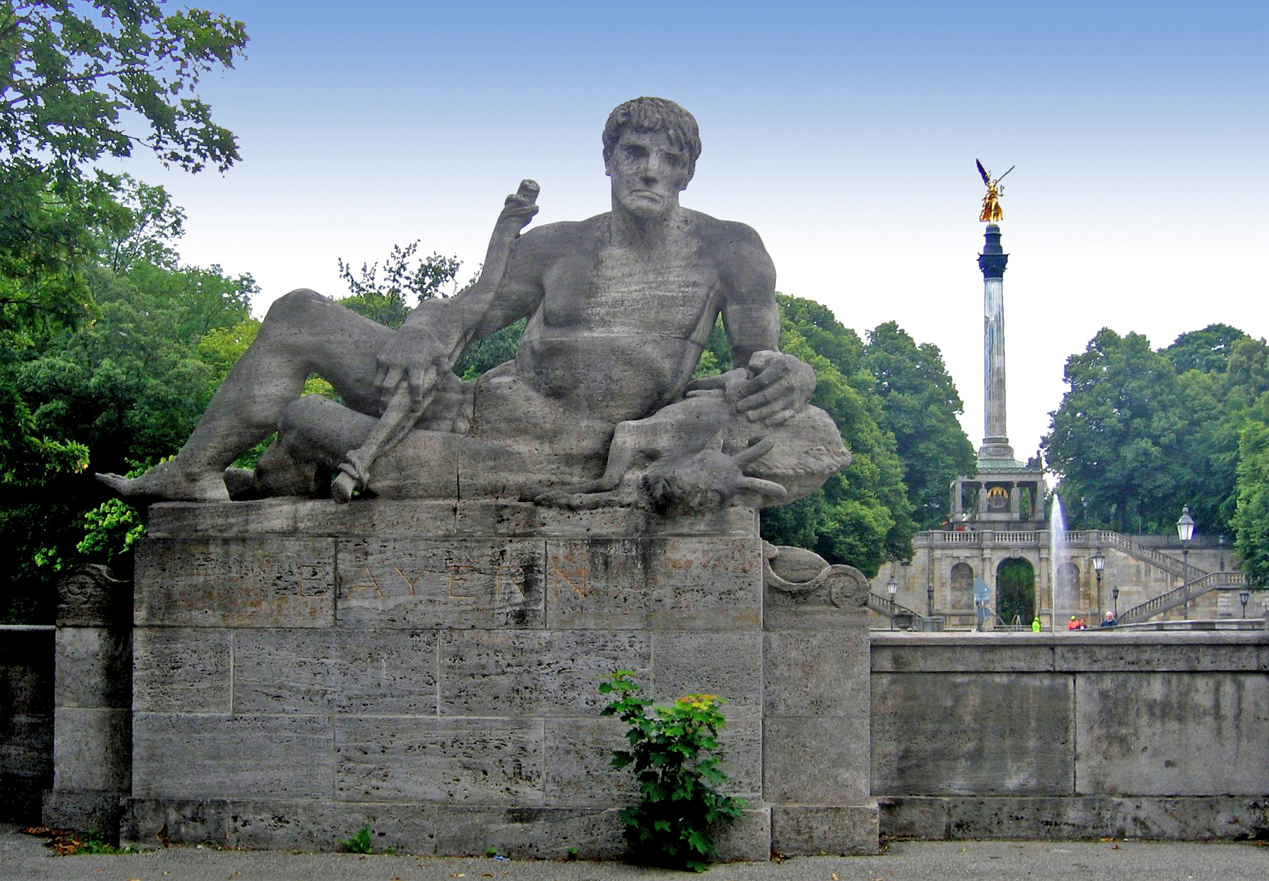 Liegeskulptur "Jäger" (1901) von Hermann Hahn an der Luitpoldbrücke, München als Symbol für Altbayern. 1954 von Joseph Wackerle erneuert.